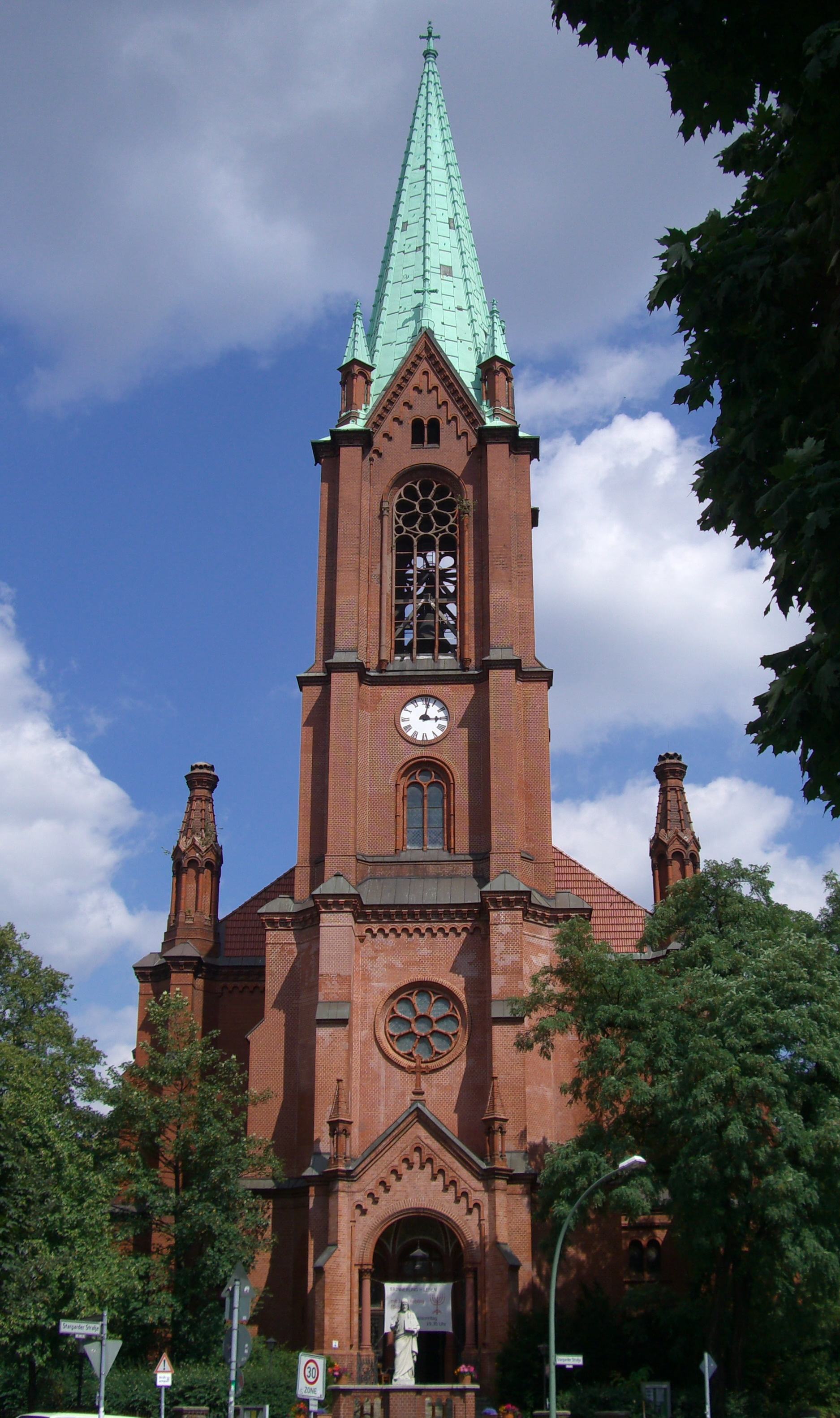 Gethsemanekirche in Berlin, Prenzlauer Berg